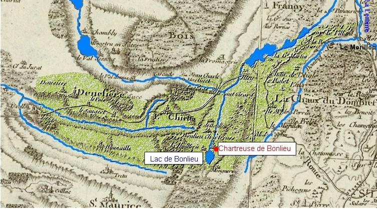 Territoire approximatif de la Chartreuse de Bonlieu - adaptation d'une carte Cassini vers 1750, domaine public carte de Cassini